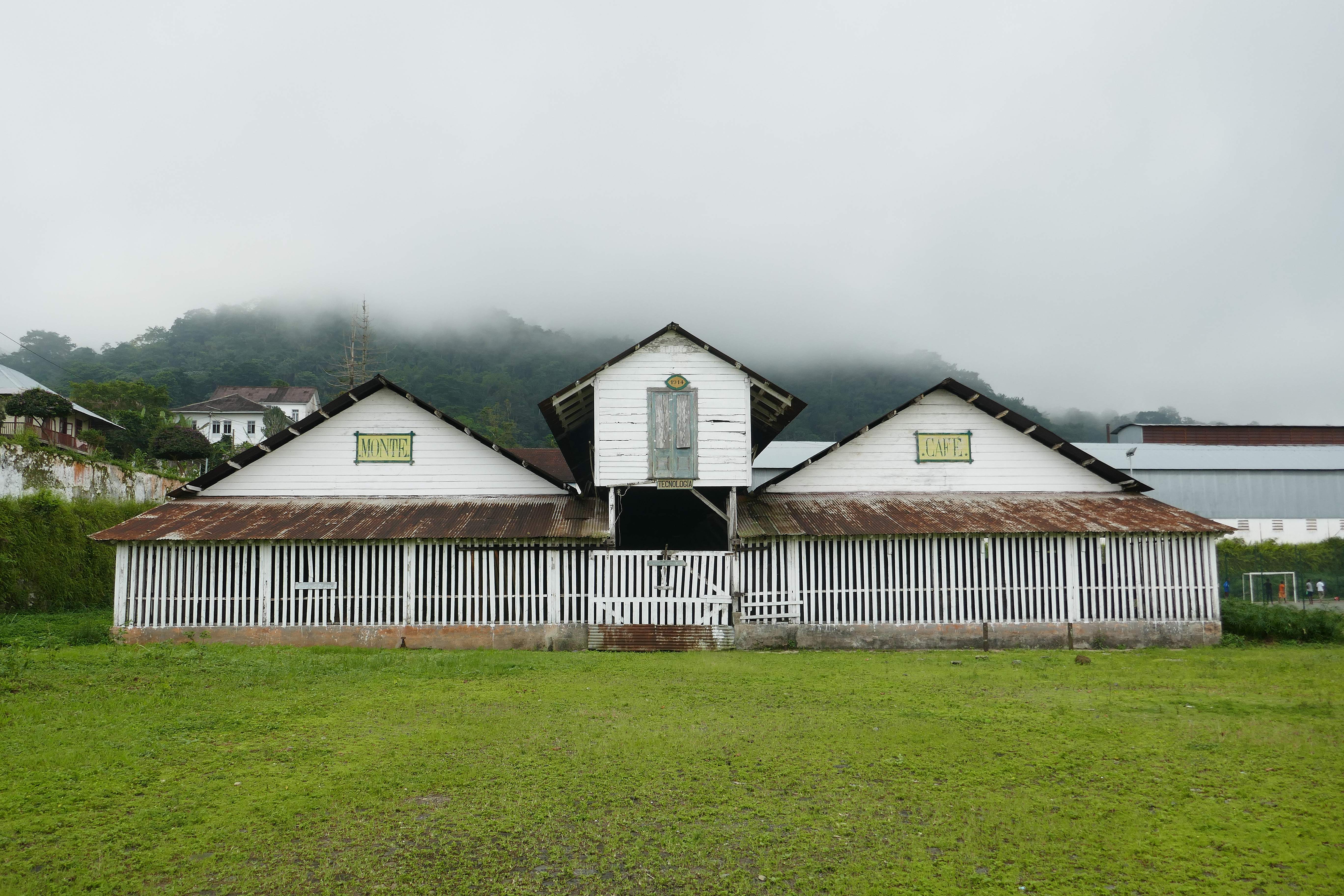 Infrastructures de l'ancienne roça de Monte Café, au nord de l'île de São Tomé, dans le district de Mé-Zóchi (São Tomé-et-Principe), qui produisait du café et du cacao. En 2019 une petite activité y susbsiste.